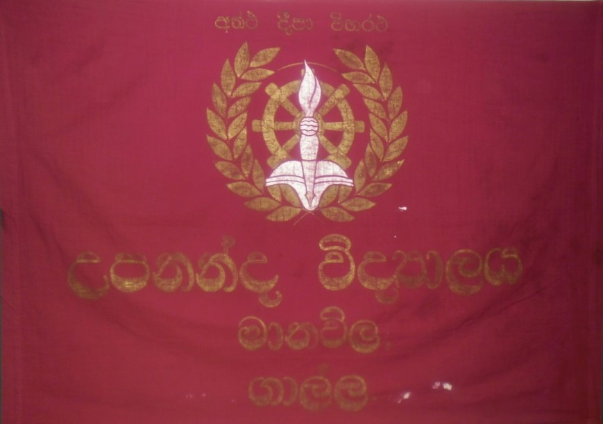 සිංහල: උපනන්ද විද්‍යාලයීය ධජය_Upananda College Flag